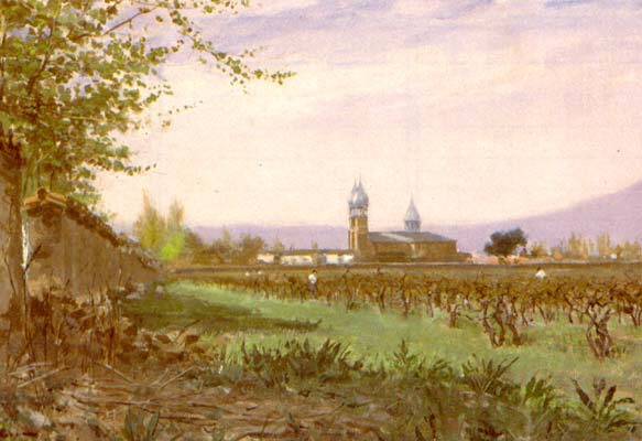 Paisaje de apoquindo Alberto Orrego Luco